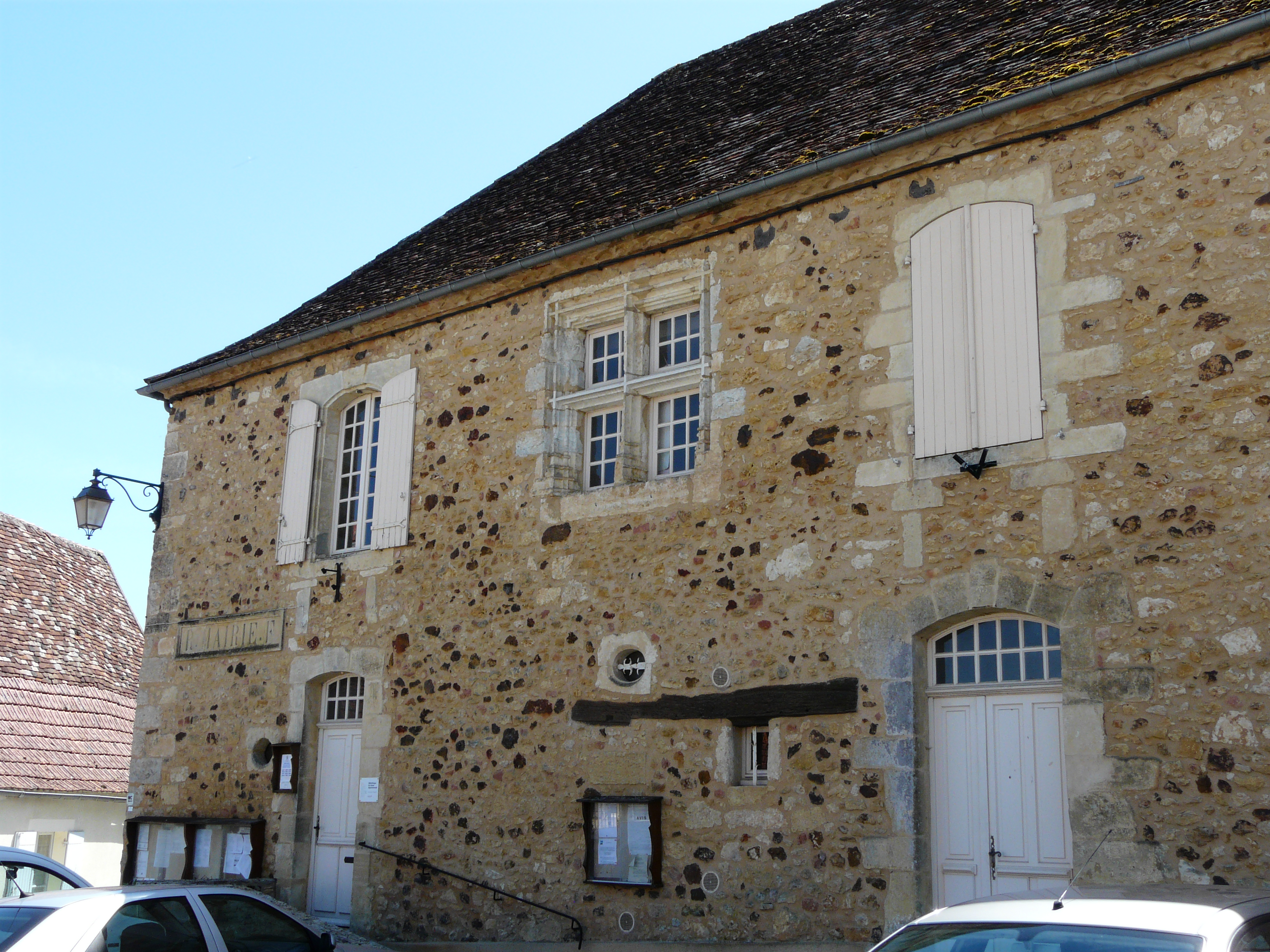 La mairie de Cendrieux, Dordogne, France.